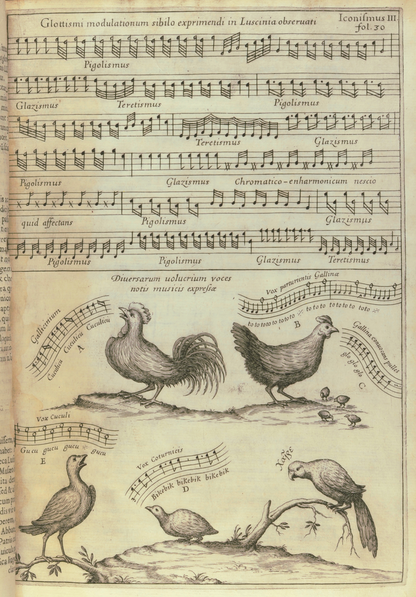 Иллюстрация с диаграммой и нотной записью птичьих голосов